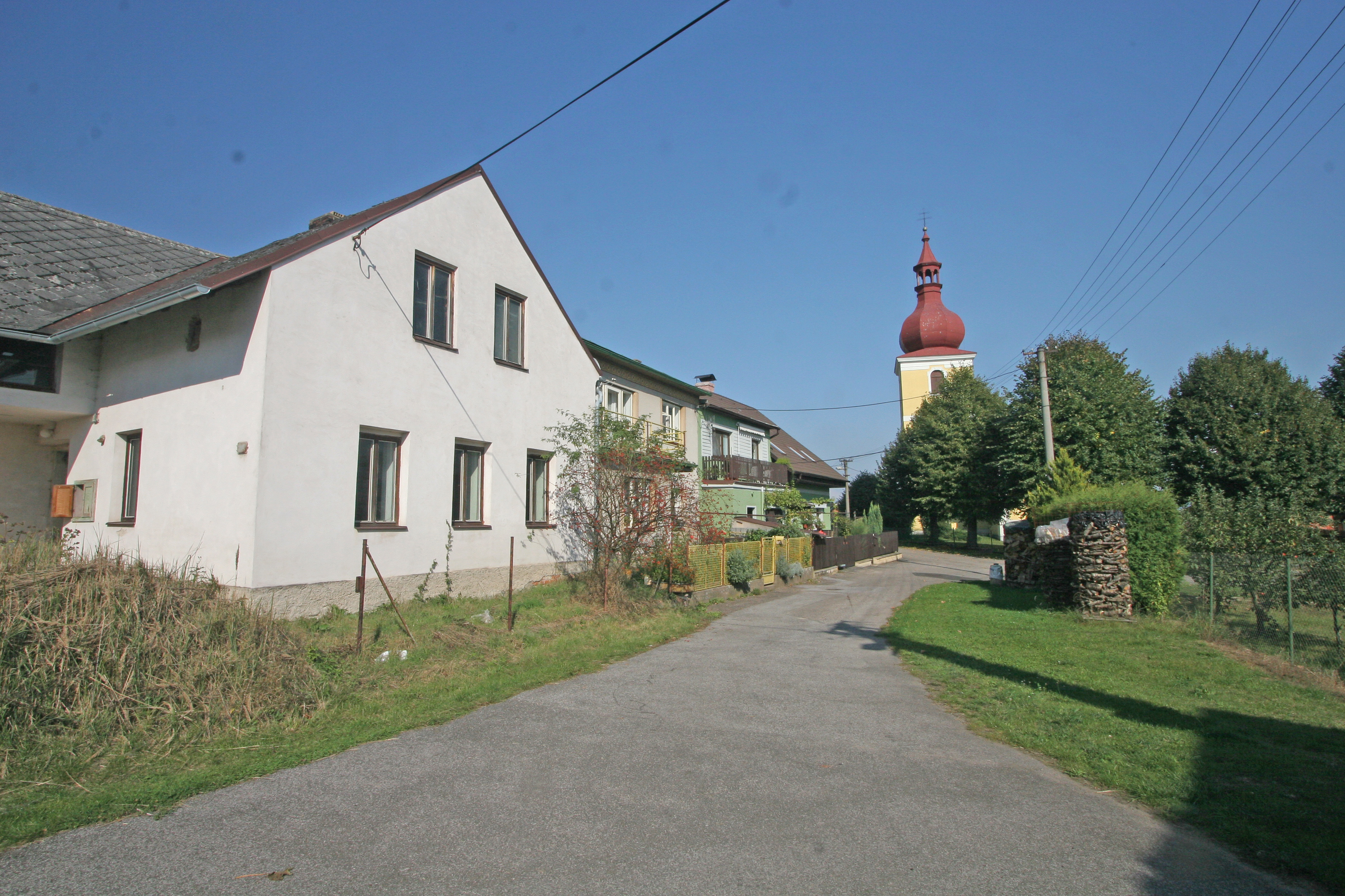 Velký Třebešov čp. 34